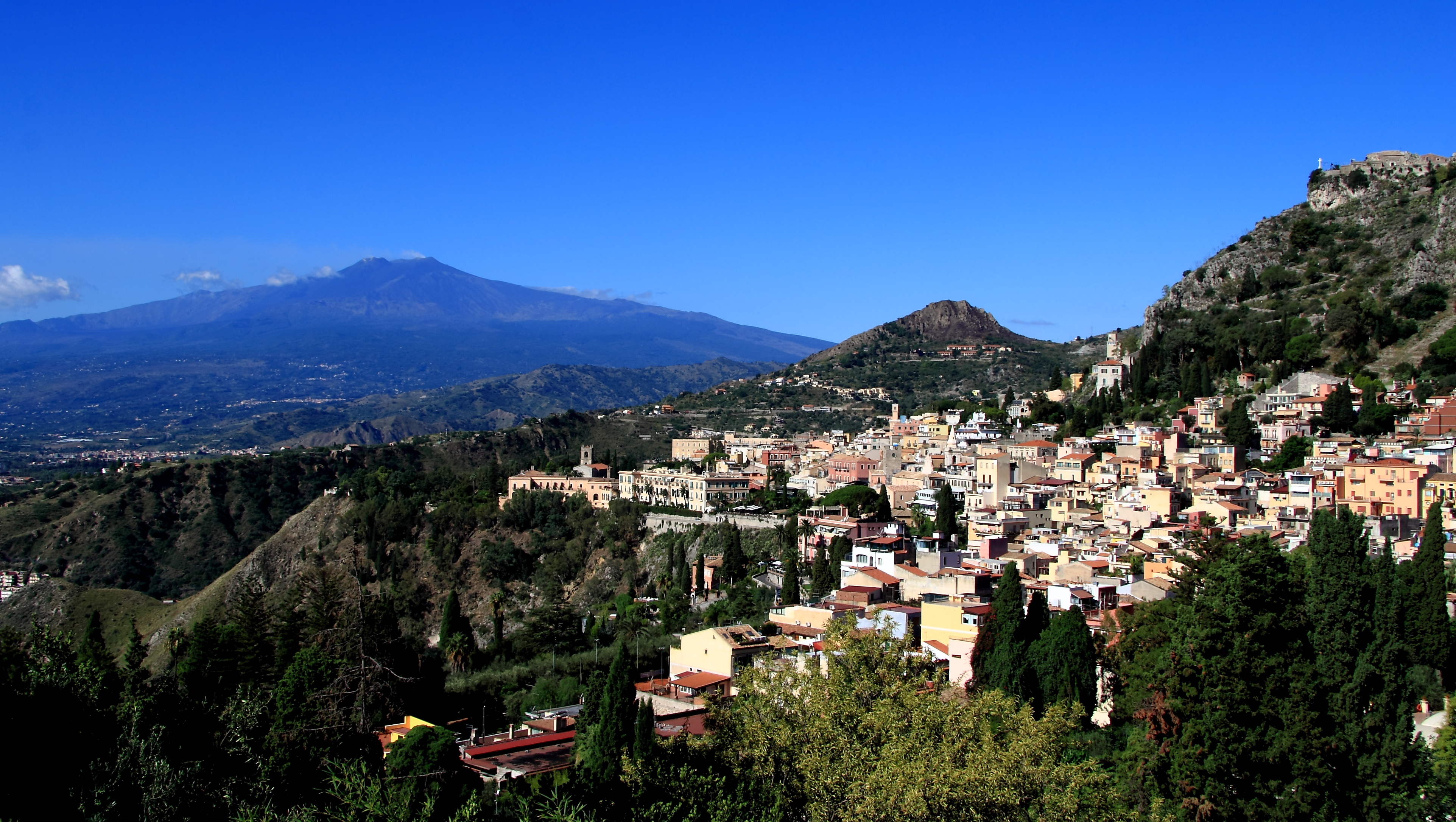 Taormina